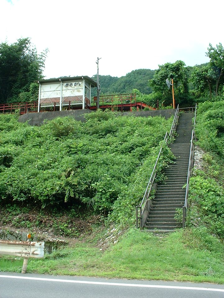 可部線（廃止区間）木坂駅 駅前からホームを見上げる